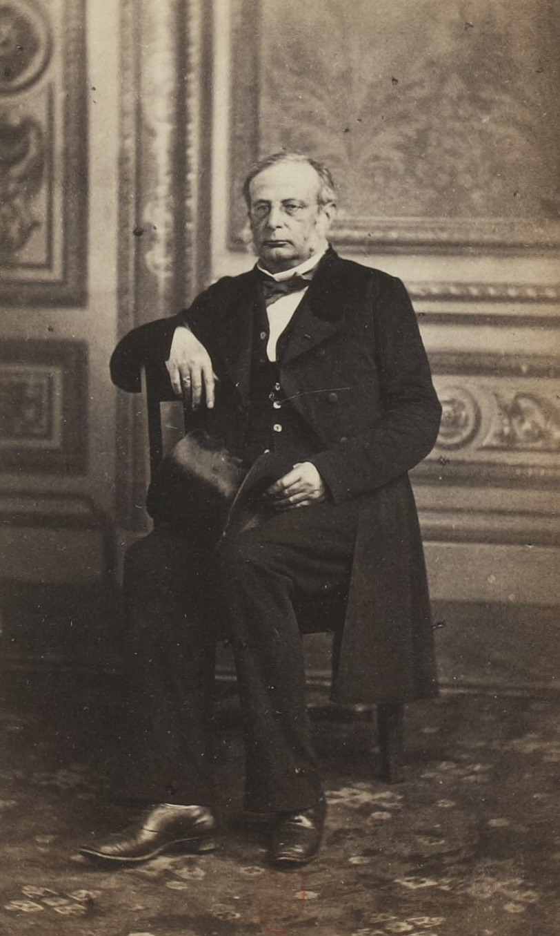 Album des députés au Corps législatif entre 1852-1857.